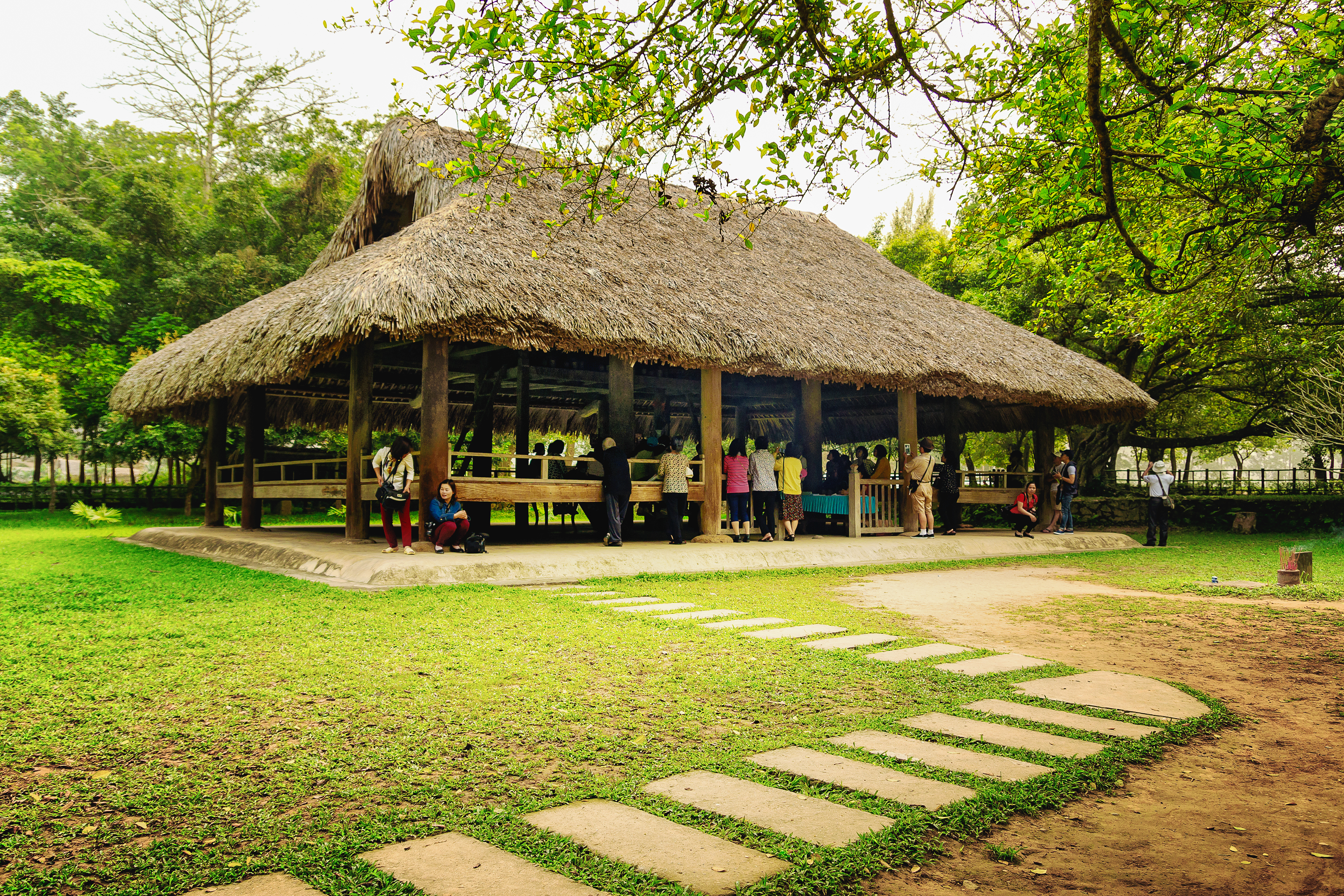 Đình Tân Trào là một di tích lịch sử; hiện tọa lạc tại thôn Tân Lập, xã Tân Trào, huyện Sơn Dương, tỉnh Tuyên Quang.